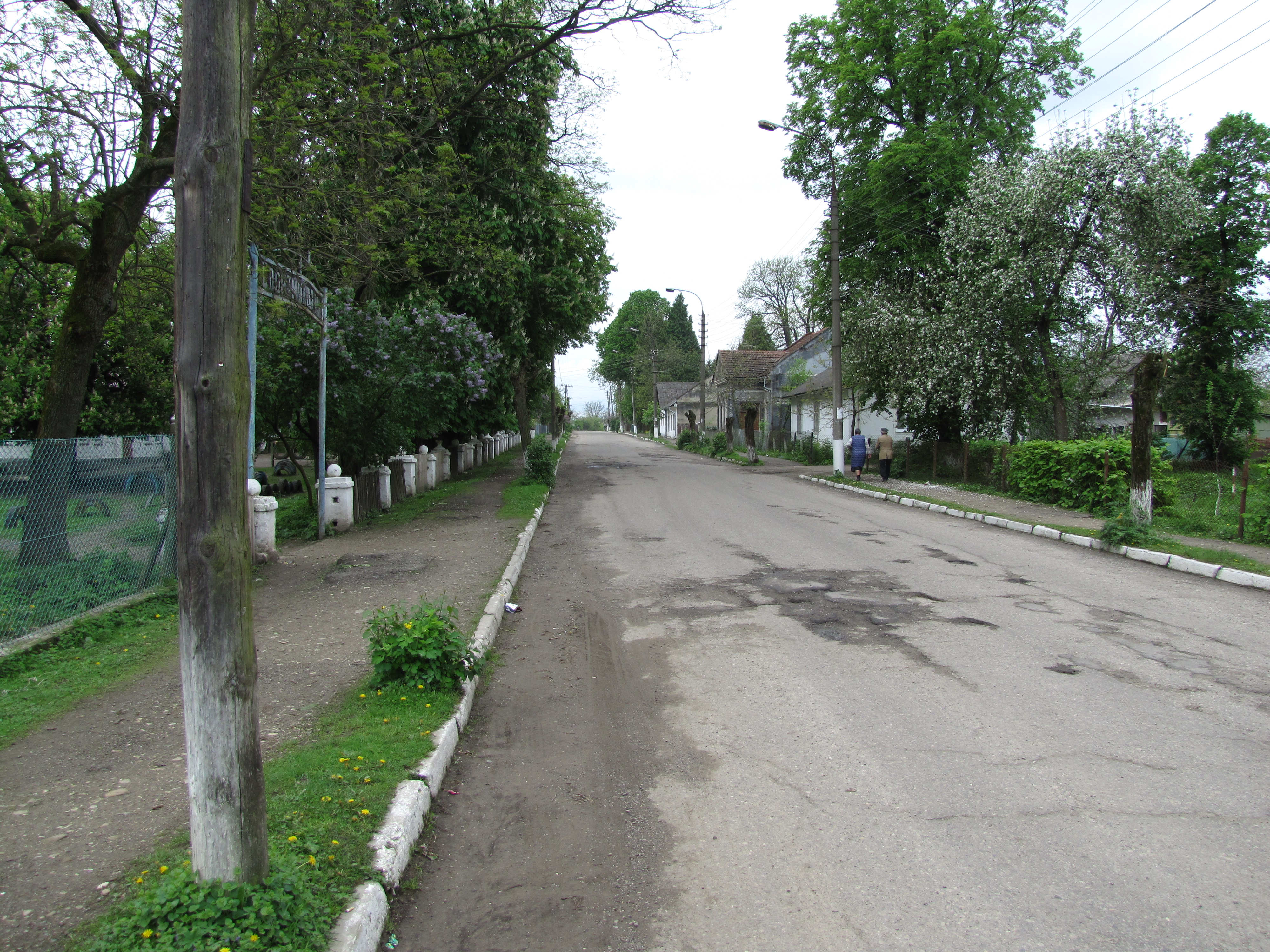 Uliczka z parterową zabudową w Niżankowicach